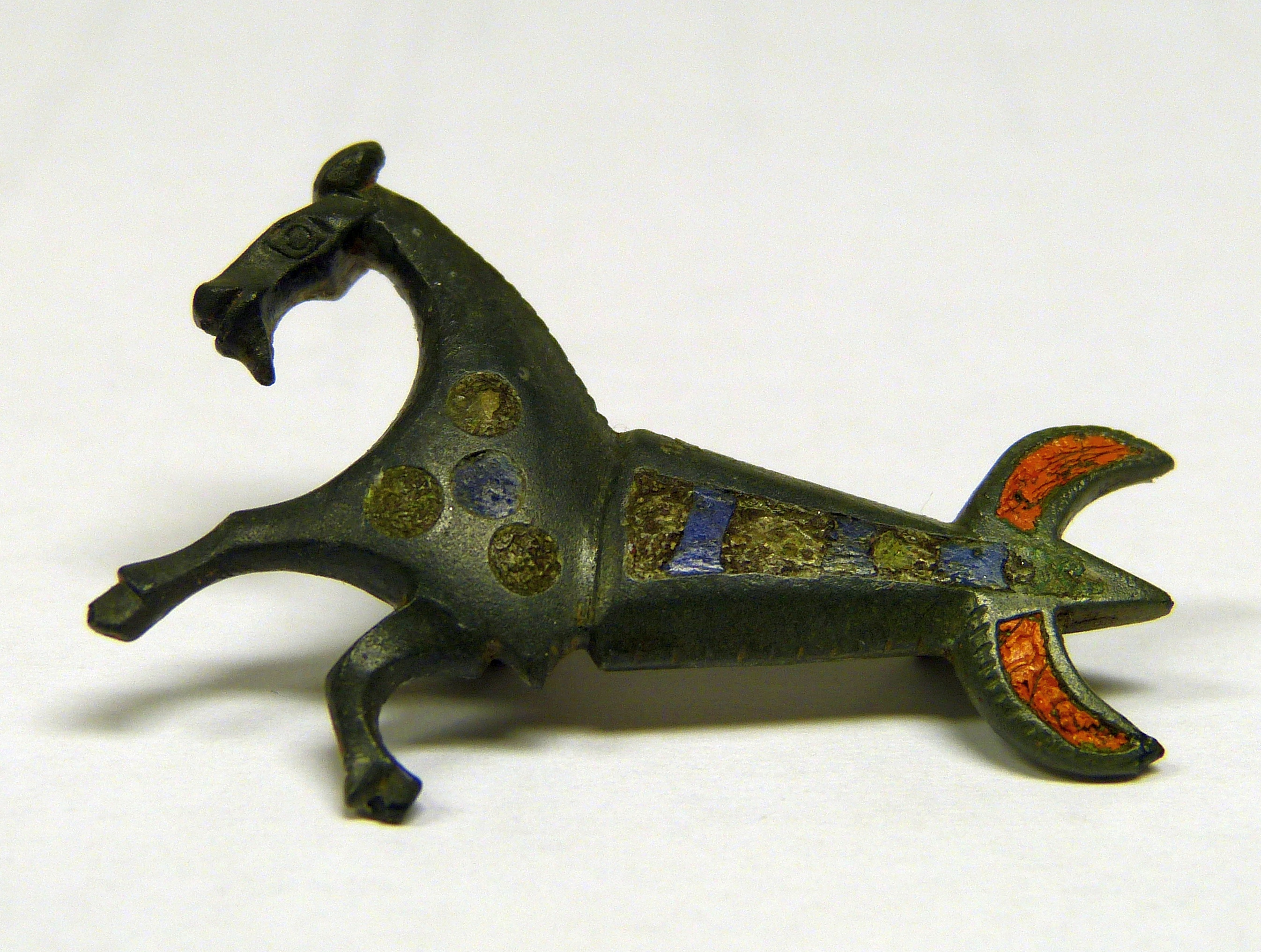 Archäologisches Museum Königsbrunn, Brosche in Form eines Capricornus (Ziegenfisches).